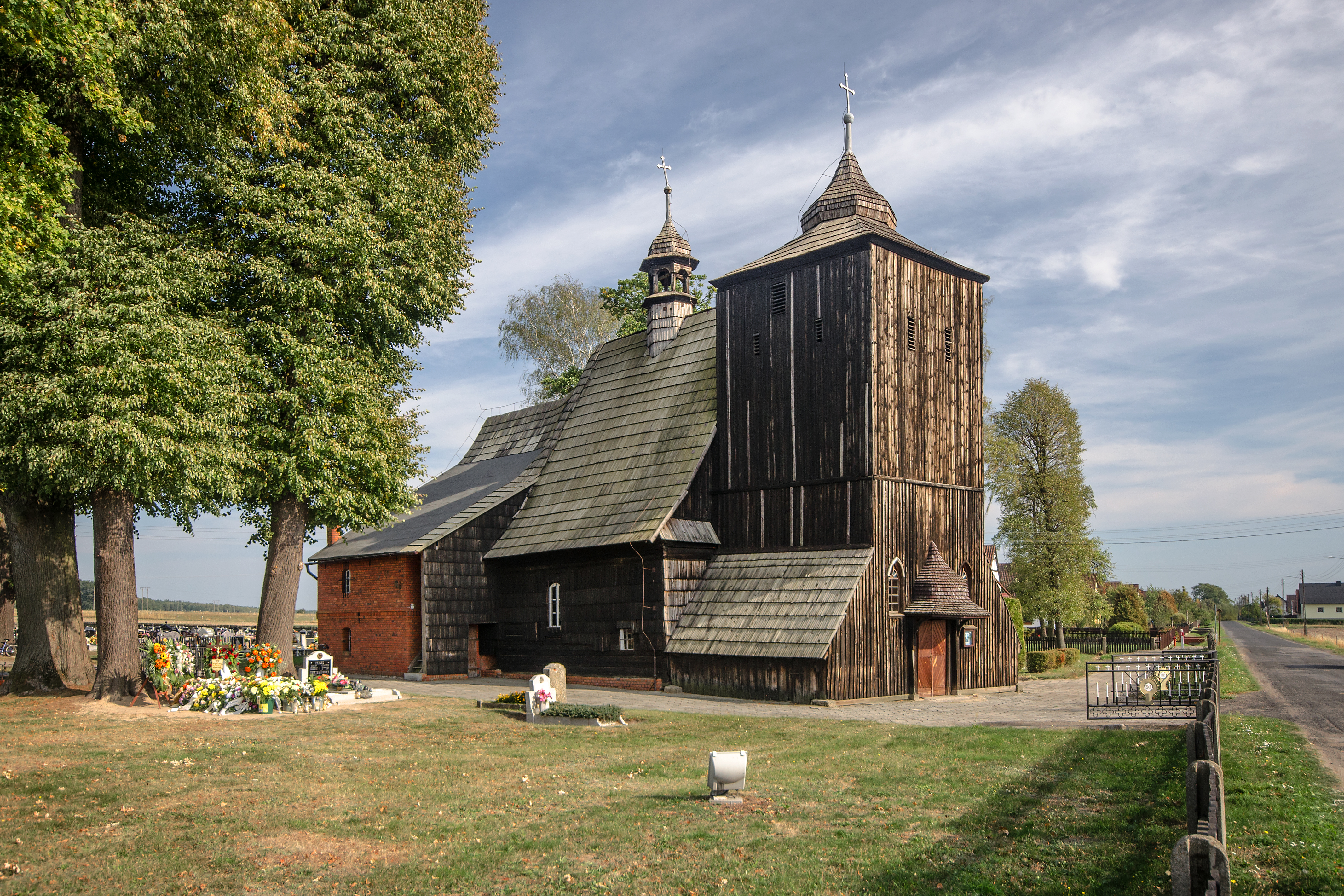 Zakrzów Turawski, kościół fil. p.w. śś. Piotra i Pawła, 1759